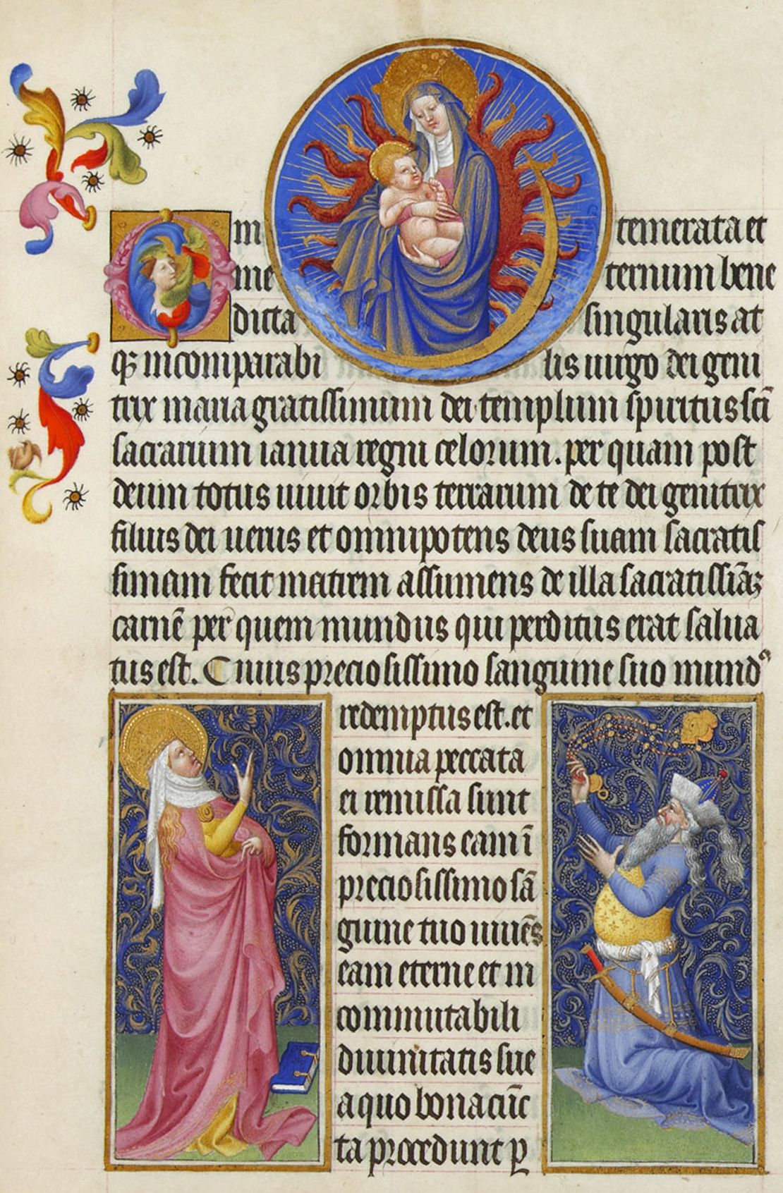 La Vierge à l'Enfant en médaillon en haut, la prophétesse Sibylle de Tivoli en bas à gauche et l'empereur Auguste (portrait de l'empereur byzantin Manuel II) en bas à droite